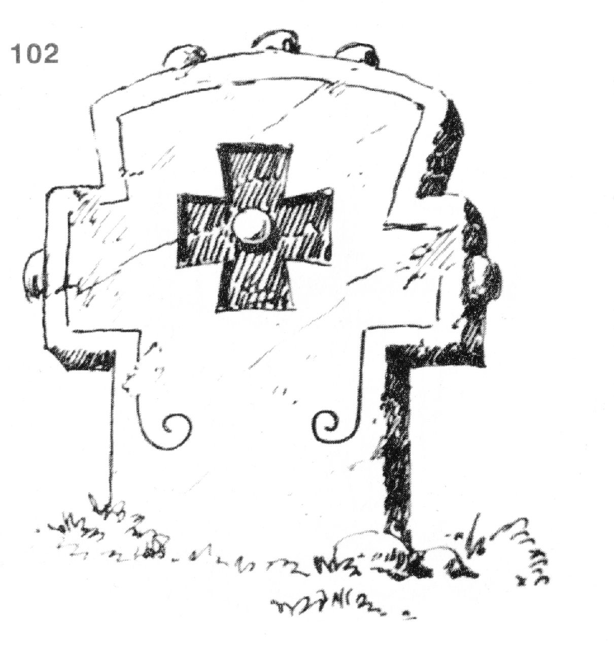 102. Кръст от бял варовик, из двора на църквата ,,Св. Възнесение". Горното му крило е закръглено, с три ябълки, страничните с по една ябълка. На лицето е издълбан равнокрилен кръст и околовръст гравирана линия, в края завита на волути. Размери: 42x29x6 см, 20-30-годишен. От гр. Орхание. Скициран на 6.1х.1929 г. (т. 14, обр. 49.)